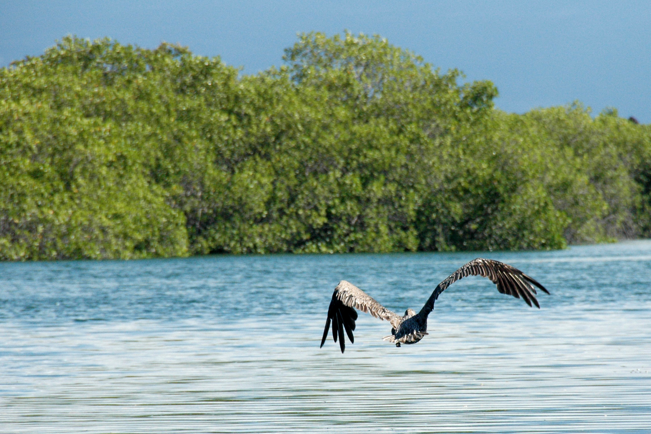 Mangrove, Elizabeth Bay, Isla Isabella, Galapagos